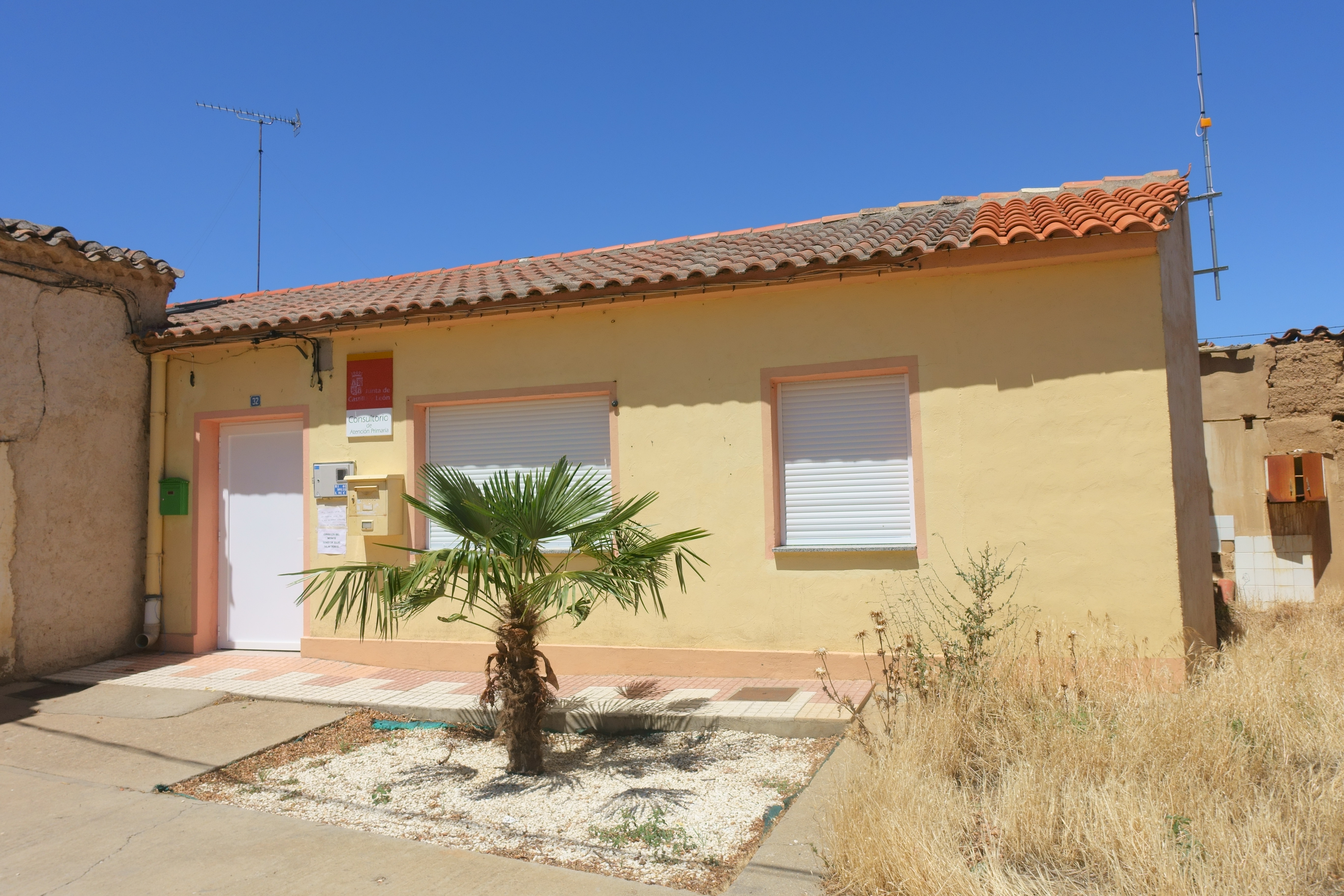 Consultorio médico de Cotanes del Monte (Zamora, España).